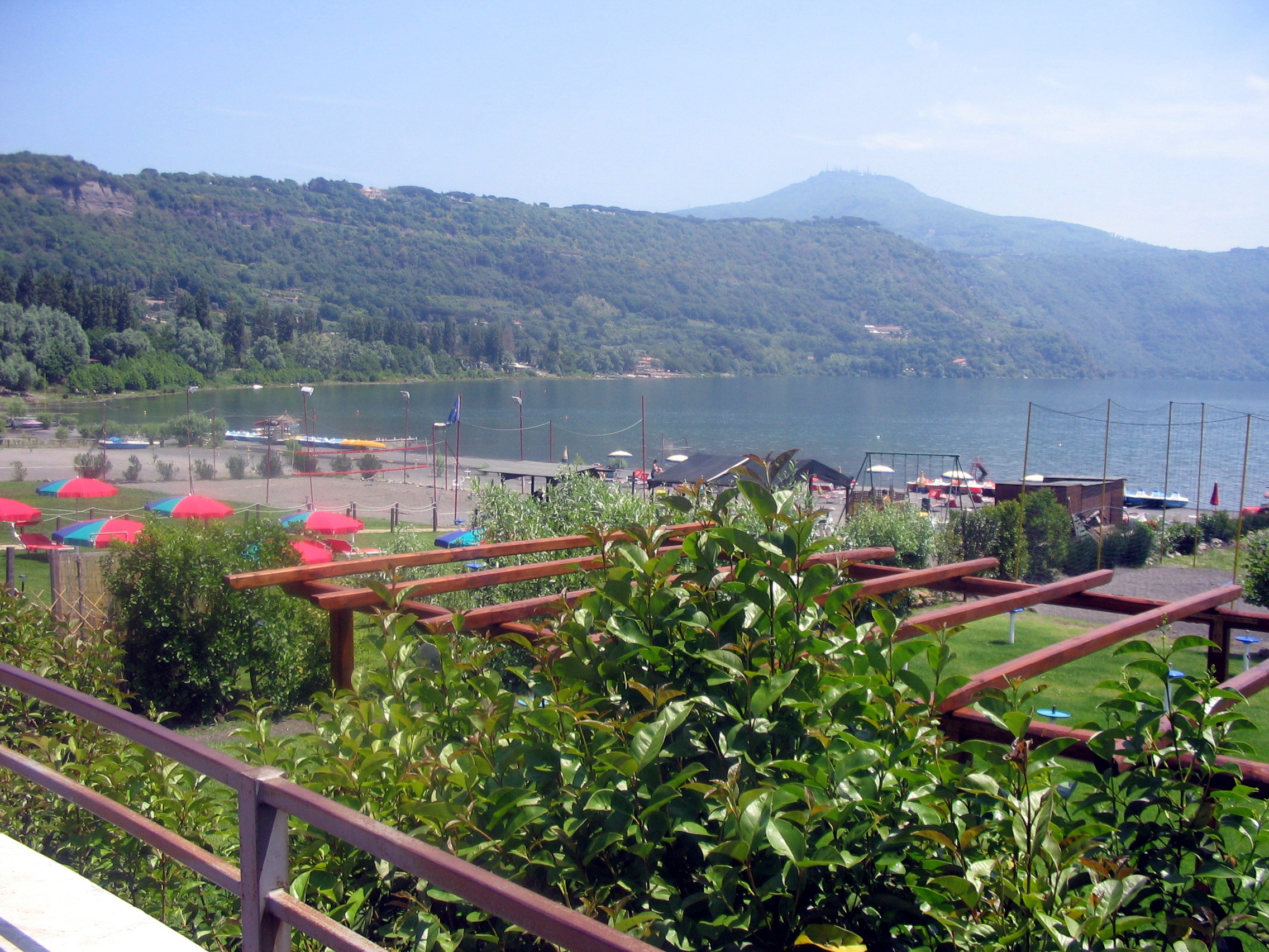 Castel Gandolfo, Lazio